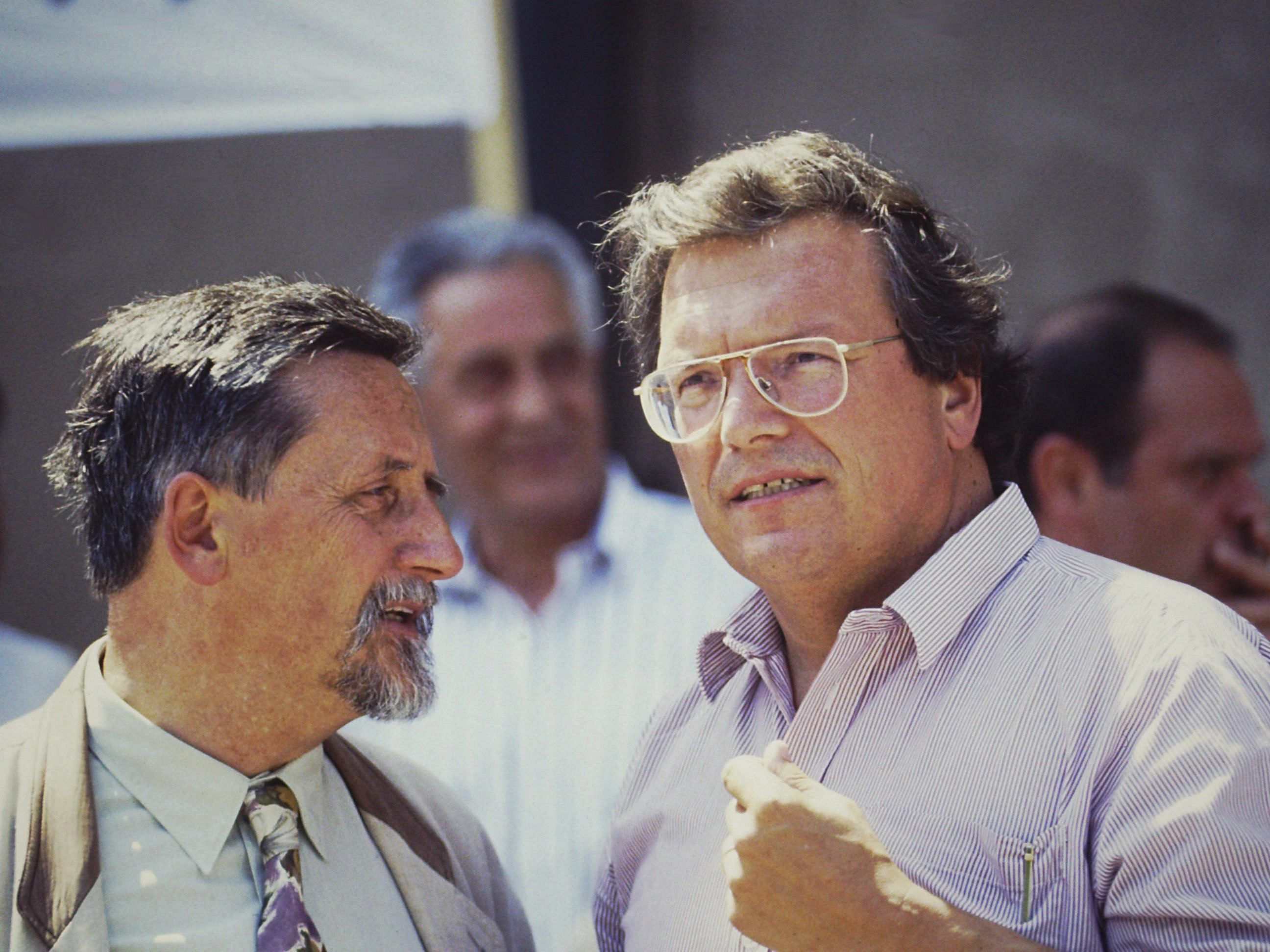 Hubert Weinzierl (links) und Hubert Weiger (rechts), Bund Naturschutz in Bayern, am Rand der jährlichen Demonstration zum Erhalt der freifließenden Donau. Passau, 2. Juli 1994